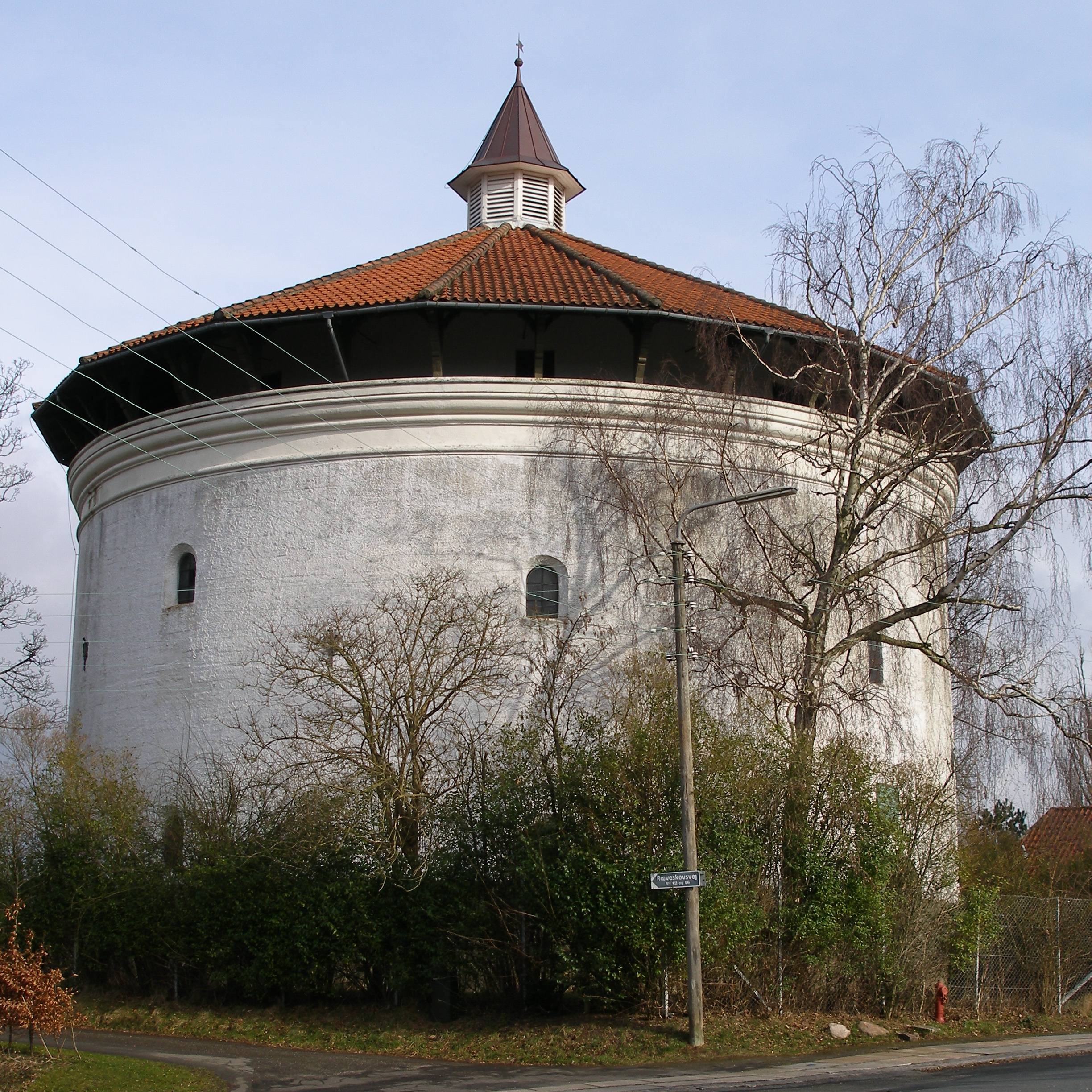 Det gamle vandtårn (opført 1905-07) på Ræveskovvej i Gentofte